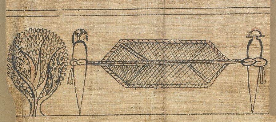 Illustration du chapitre 153 du Livre des Morts, Egypte antique, XXIe dynastie.